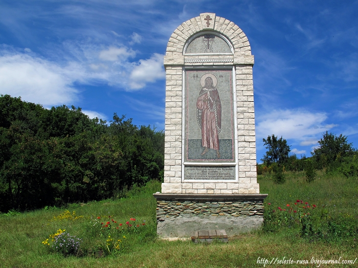 Мозаичная икона пророка Илии. Заволжский монастырь в честь Честного и Животворящего Креста Господня